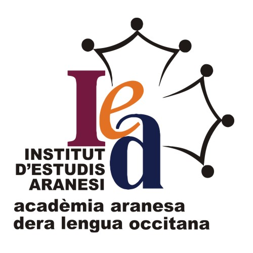 Logotip de l'Institut d'Estudis Aranesi - Acadèmia aranesa dera lengua occitana